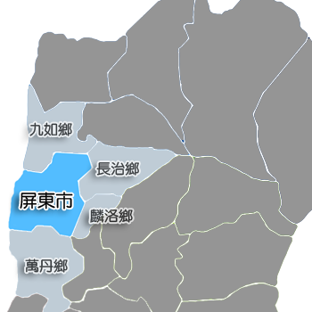 中文（台灣）: 屏東縣屏東市相對位置。